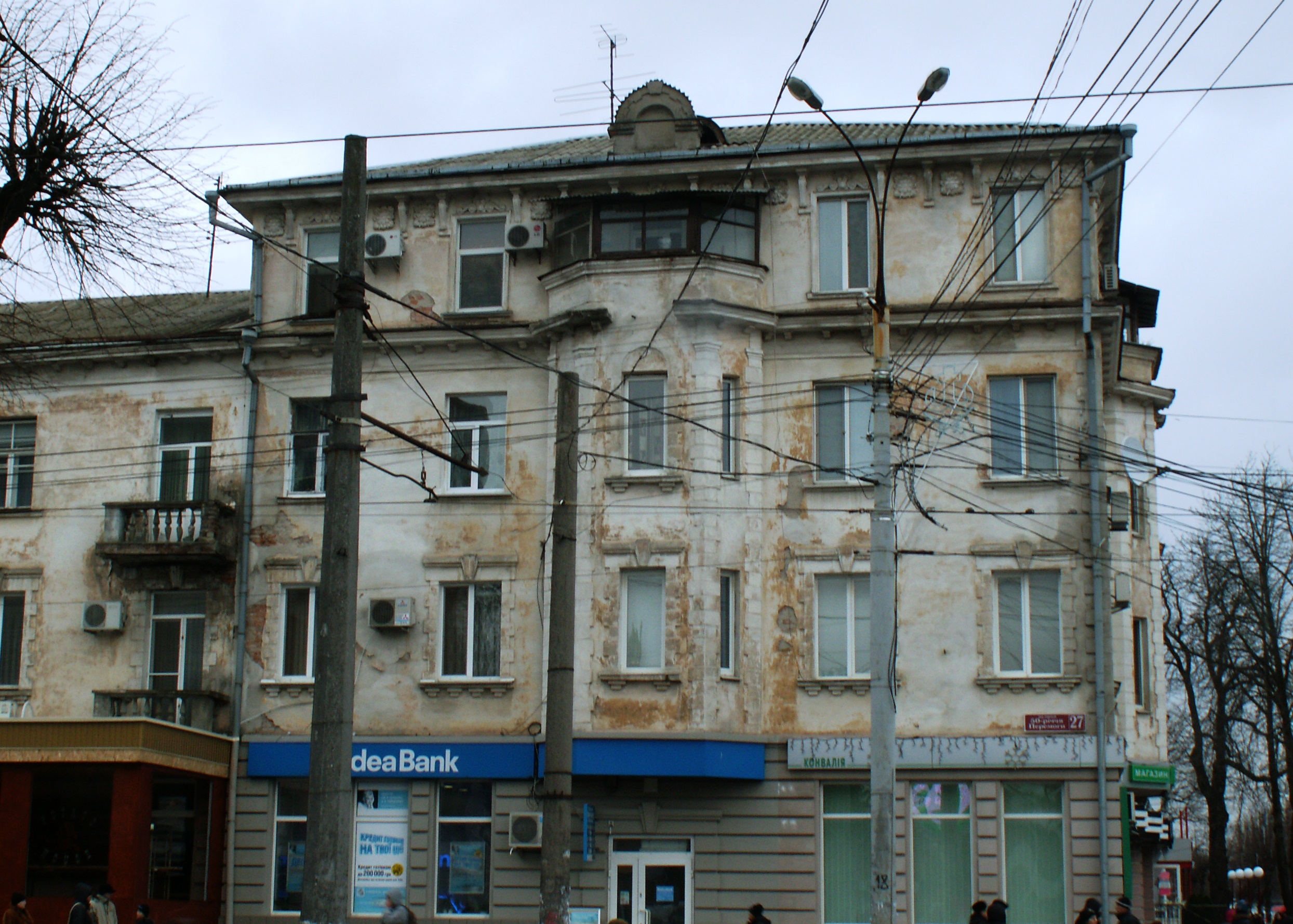 Vinnytsya_Ukraine_Kotsyubynskiy_str_56 Арх. А. Крейчі